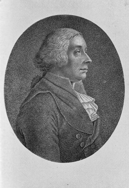 Ludwig Julius Friedrich Hoepfner, (* 3. November 1743 in Gießen; † 2. April 1797 in Darmstadt)